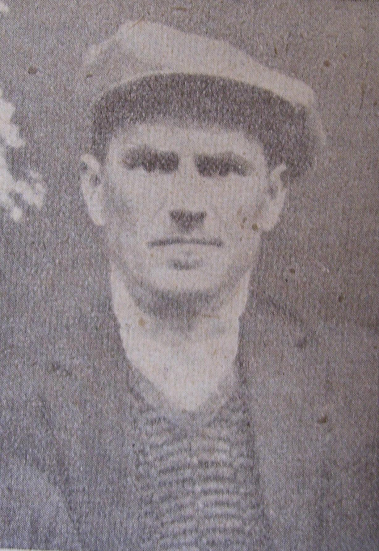 Нишко Чергана